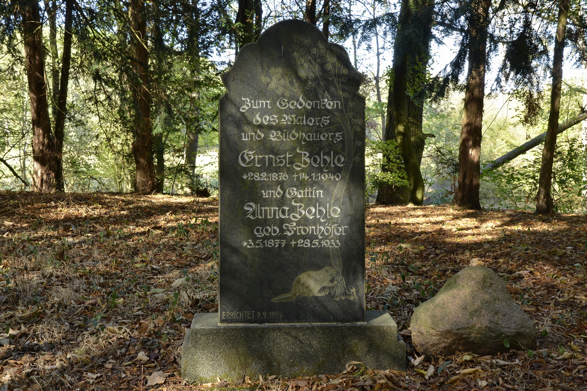 Grabstein von Ernst Zehle und Anna Zehle auf dem Försterfriedhof Lödderitz